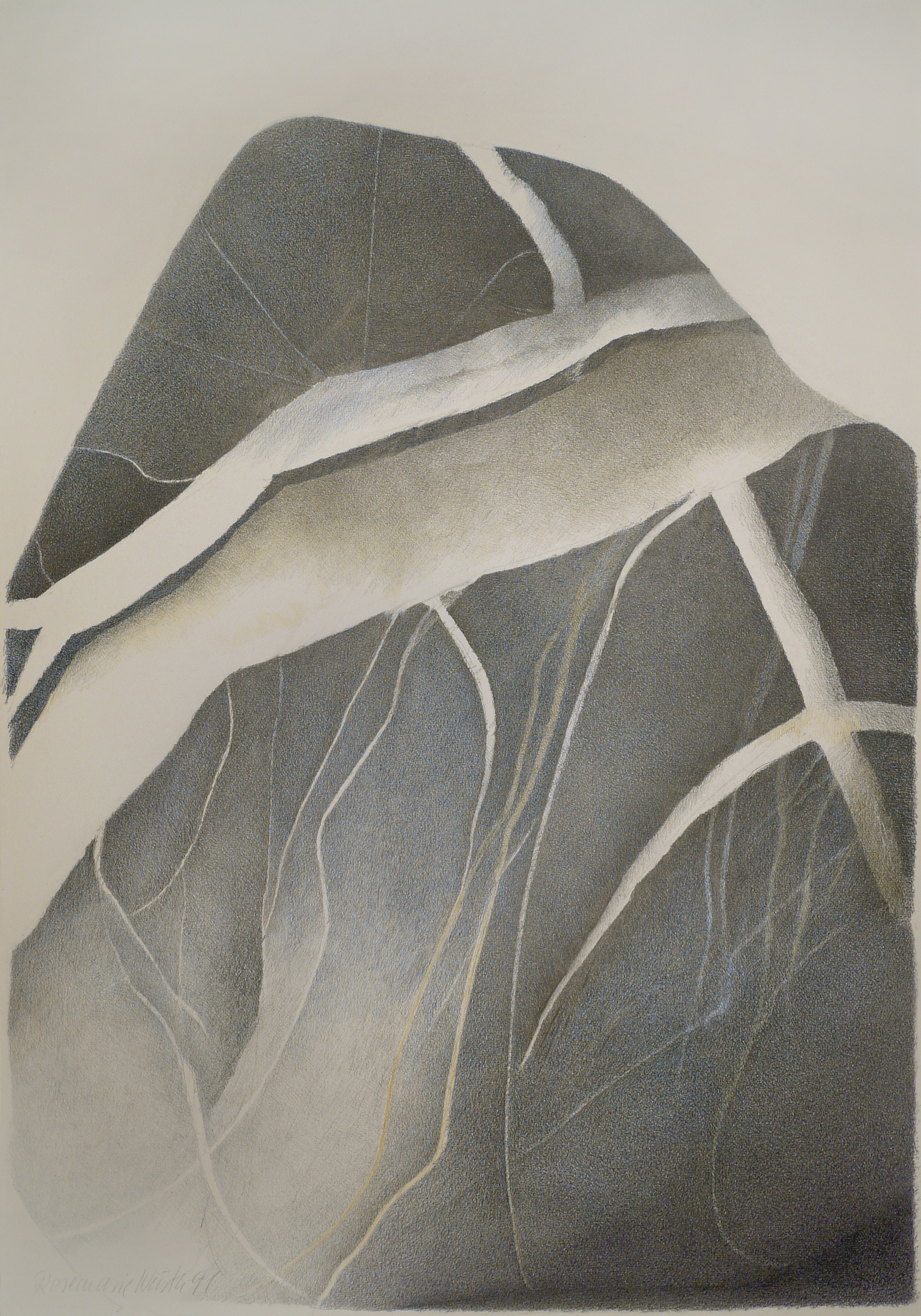 Zeichnung der Künstlerin Rosemarie Würth, Farb- und Bleistift auf Papier ...